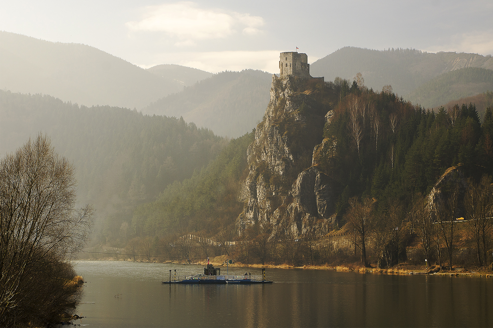 Strečniansky hrad v rannom opare